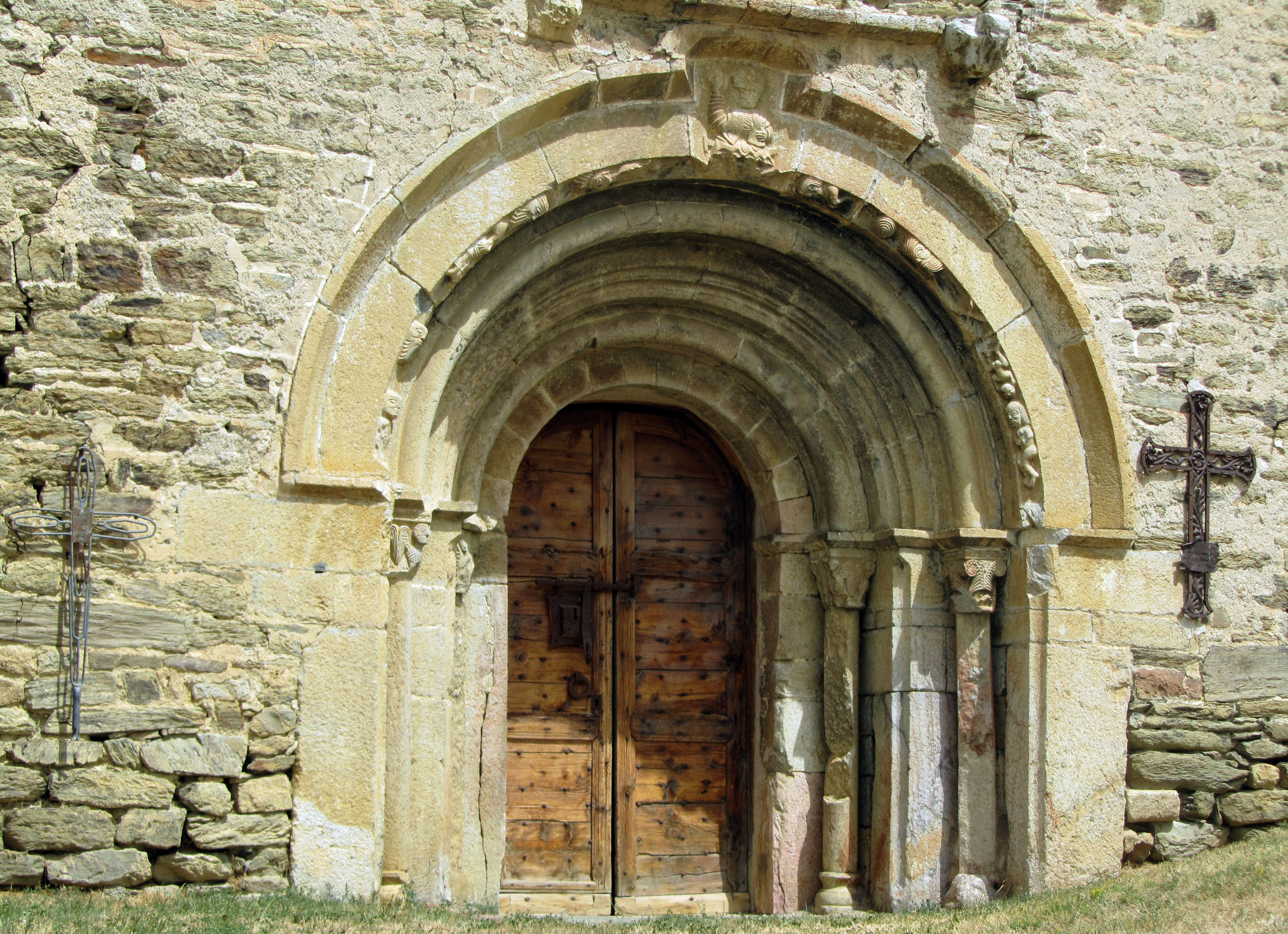 Portada de la iglesia románica de Santa Eugenia de Saga en la Cerdanya Baixa. Cataluña